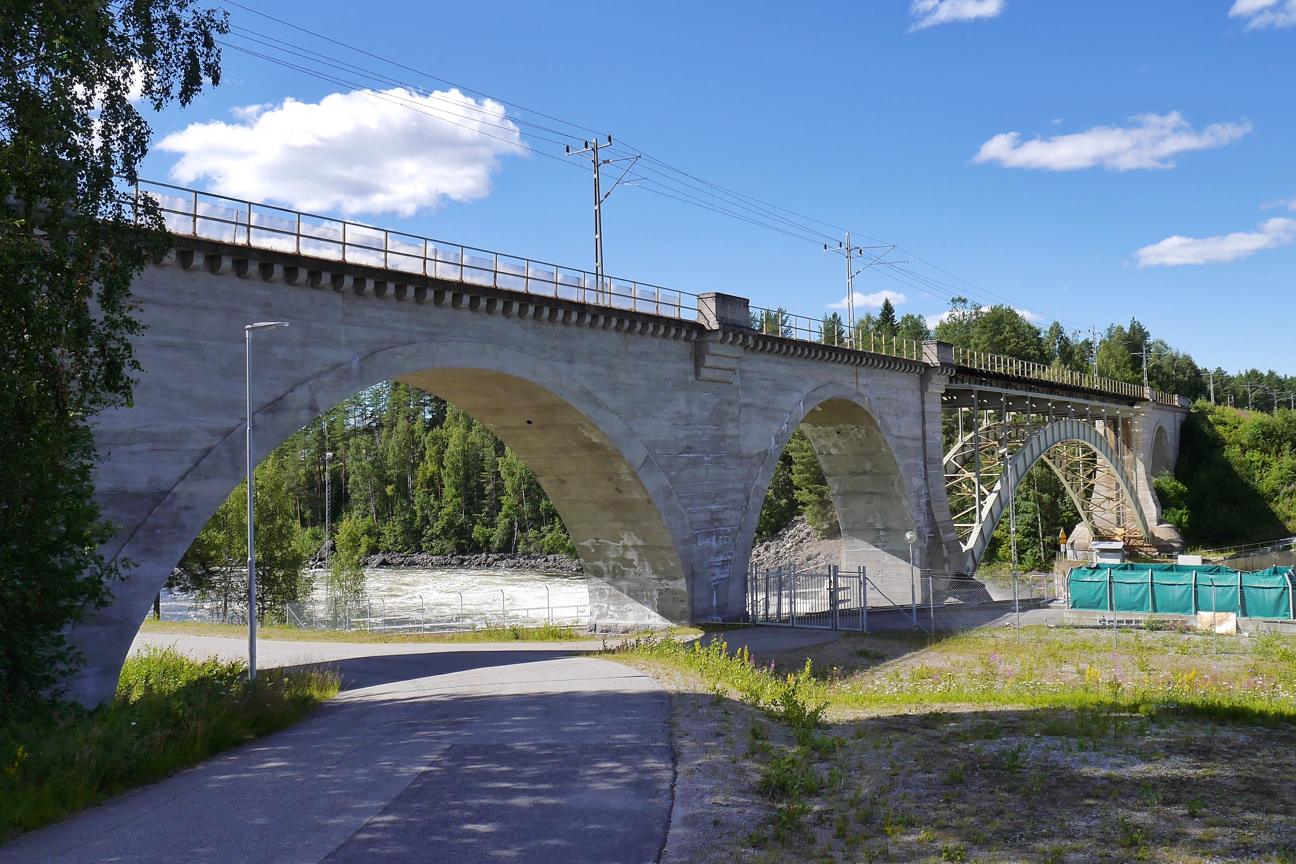 Järnvägsbron över Piteälven vid Sikfors (Sikfors 100:8). Bron byggdes 1911-1912 och togs i bruk 1914. Brons hela längd är 155 meter. Den har fyra spann och spannens spännvidd är 15+58,3+20+24 meter. Detta är ett foto av en svensk skyddad bebyggelse, anläggning nummer 21300000024811 i RAÄ:s bebyggelseregister (BBR).